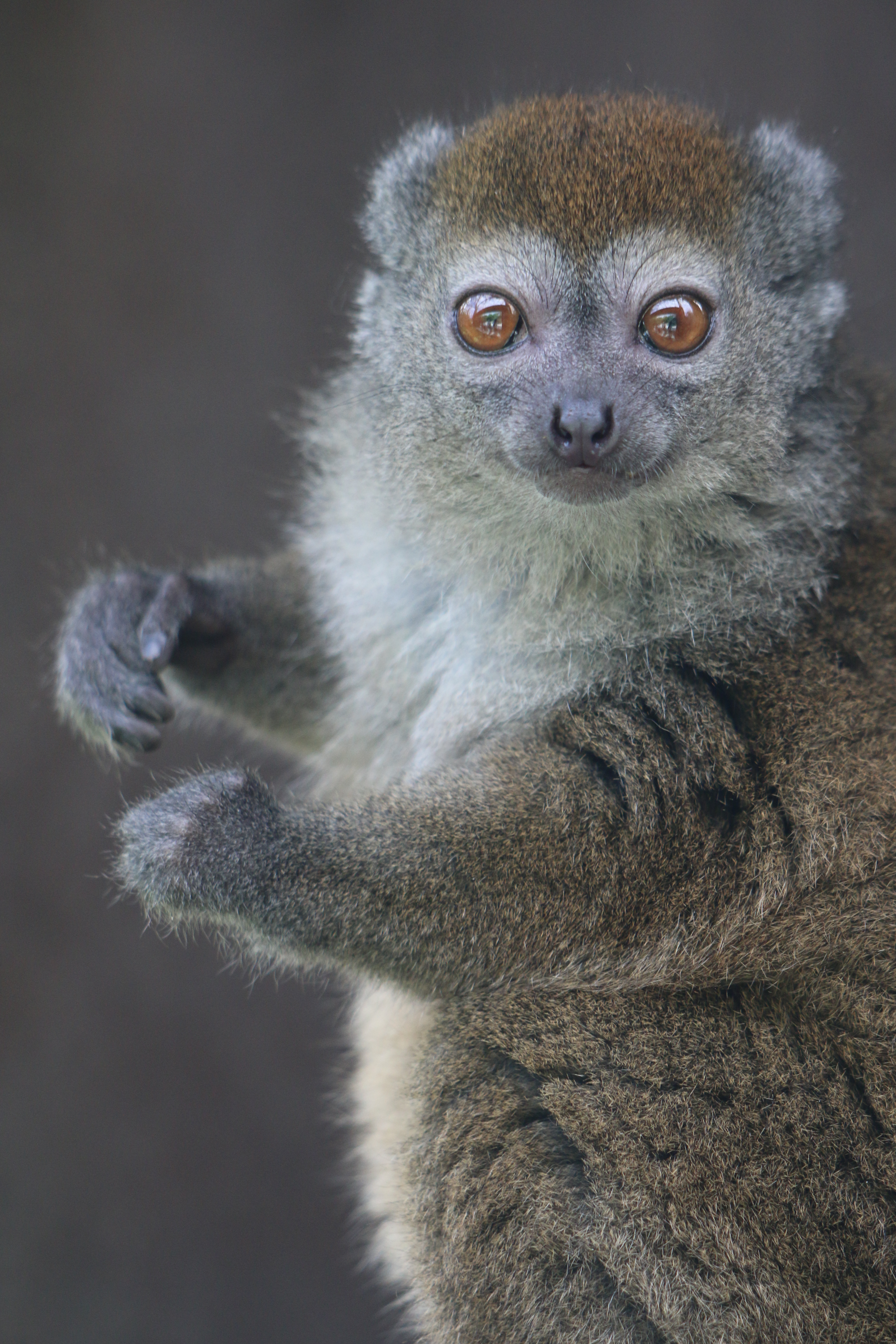 Hapalémur gris (Hapalemur griseus), Parc Zoologique de Paris